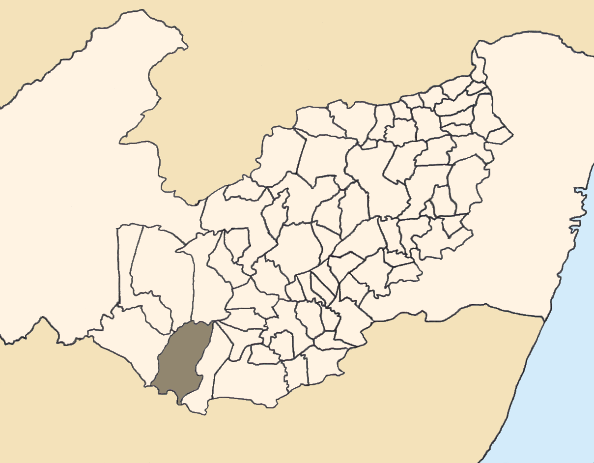 Mapa da mesorregião Agreste de Pernambuco (Brasil) subdivida em municípios. Em destaque, o município de Águas Belas. Map of the brazilian state of Pernambuco (mesorregião Agreste) showing the city of Águas Belas. Imagem tratada com o GIMP. Image made with GIMP.